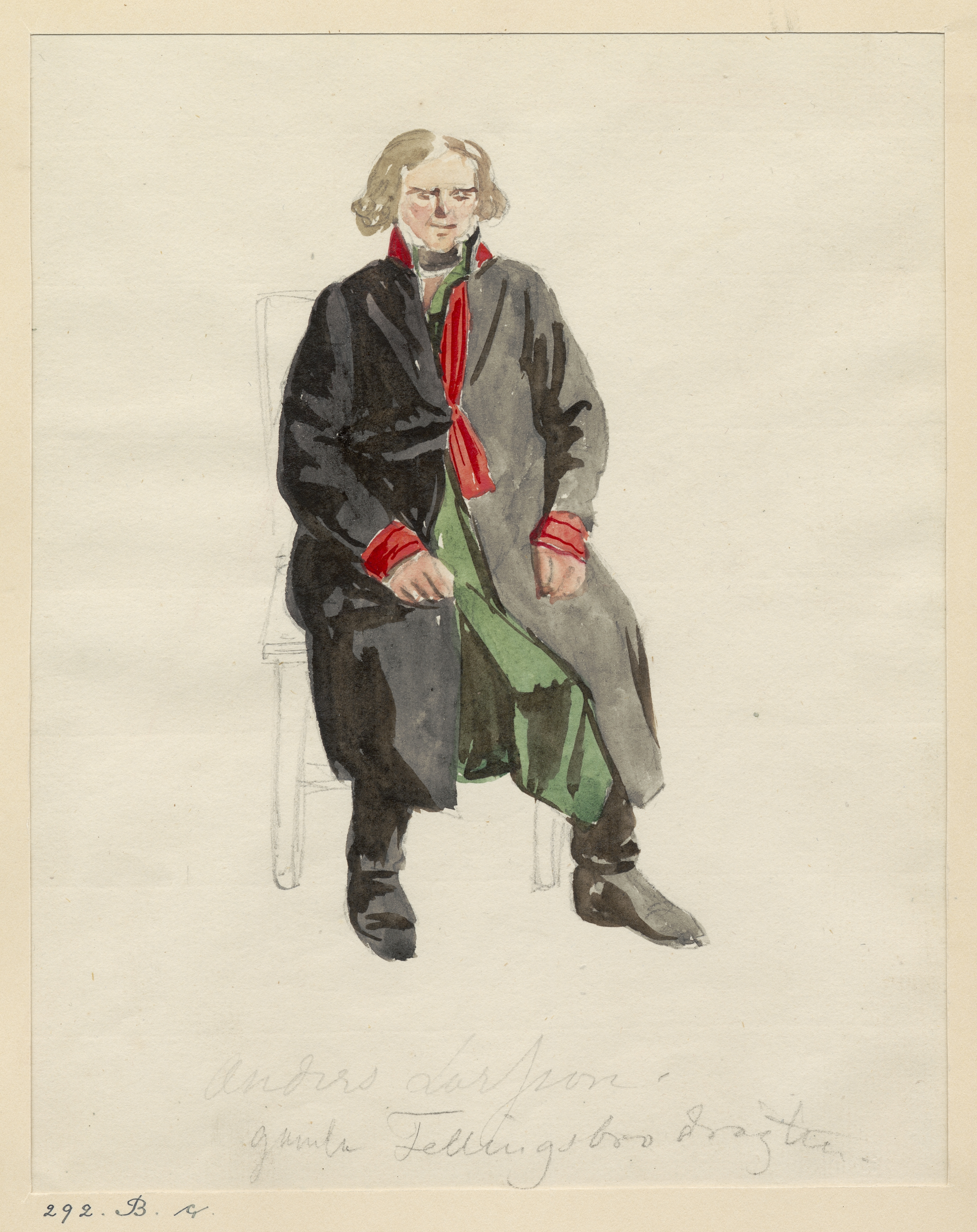 Akvarell Gamla Fellingsbrodräkten. (sittande). Västmanland. Fellingsbro sn. Akvarell av J. W. Wallander